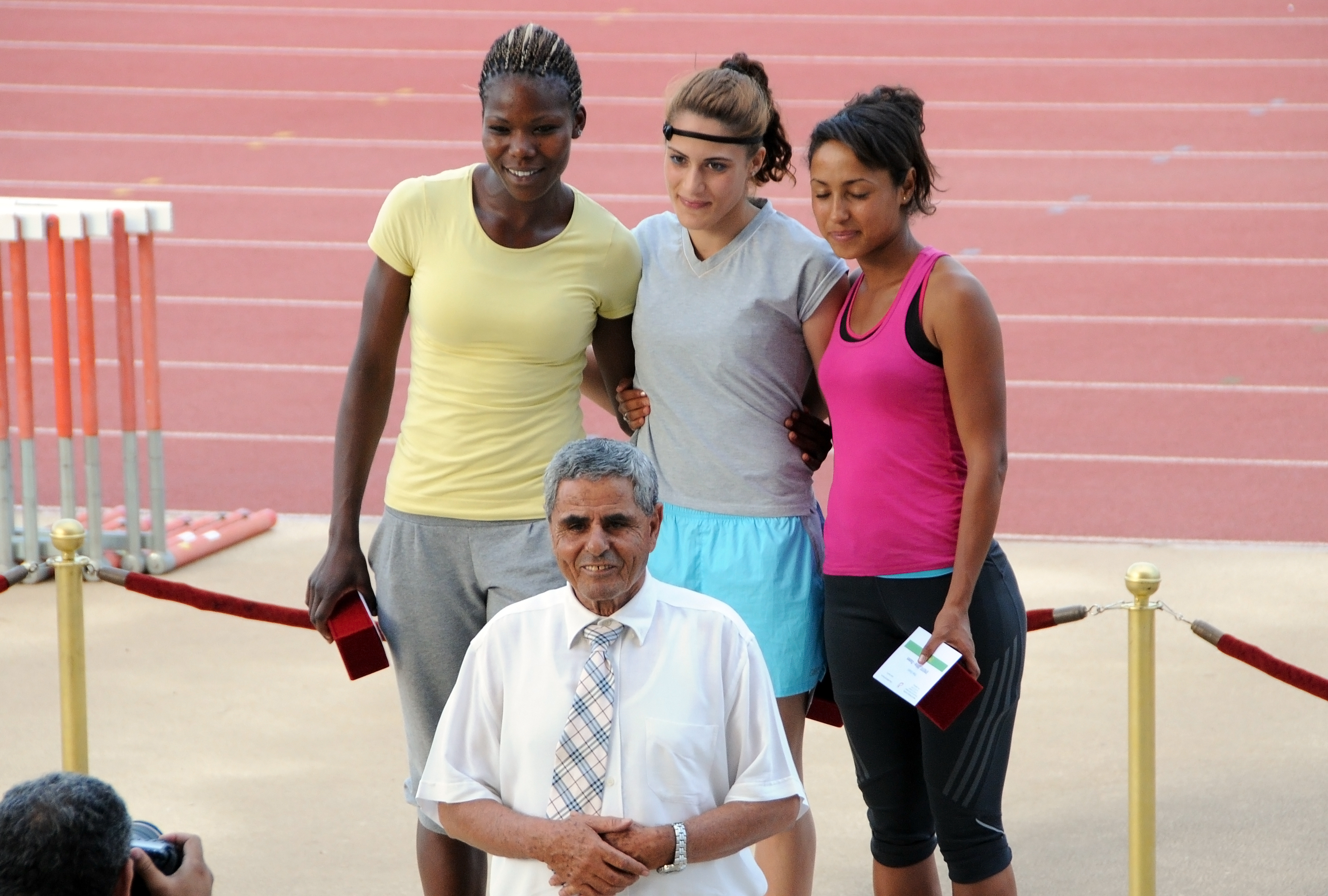 Podium du 200m féminin du meeting international de Tunis 2012. Mohamed Gammoudi a remis les prix aux vainqueurs. La médaille d'or est attribuée à LAKHAL Eya (Tunisie, au milieu), la médaille d'argent à l'algérienne BOURAHLA Kheira et la médaille de bronze à CHEROUDI Nada (Tunisie, à gauche)